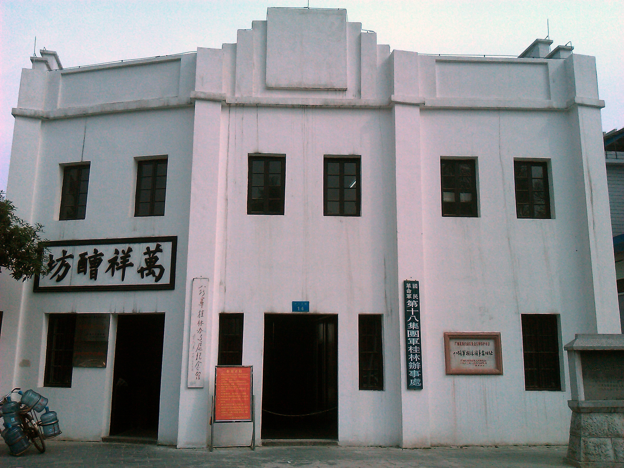 八路军桂林办事处旧址正面照